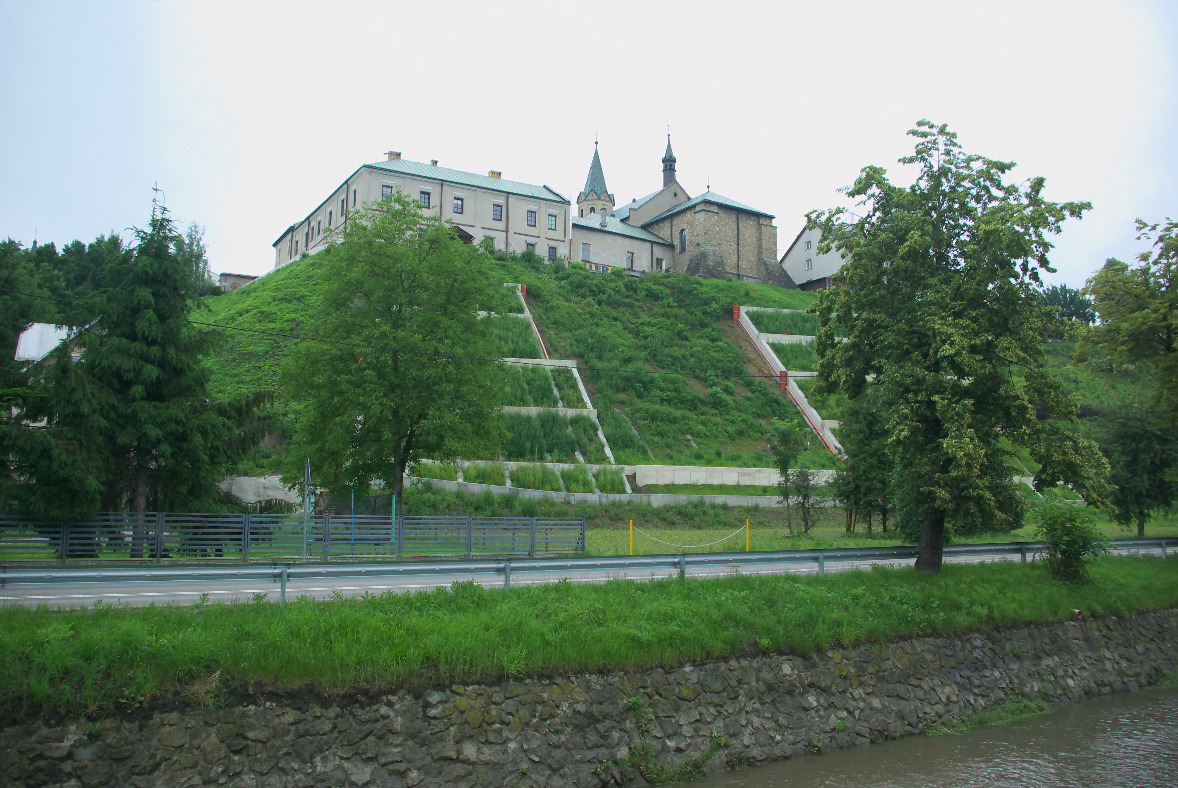 Zrekonstruowana w 2020 skarpa poniżej kościoła i klasztoru franciszkanów w Sanoku.